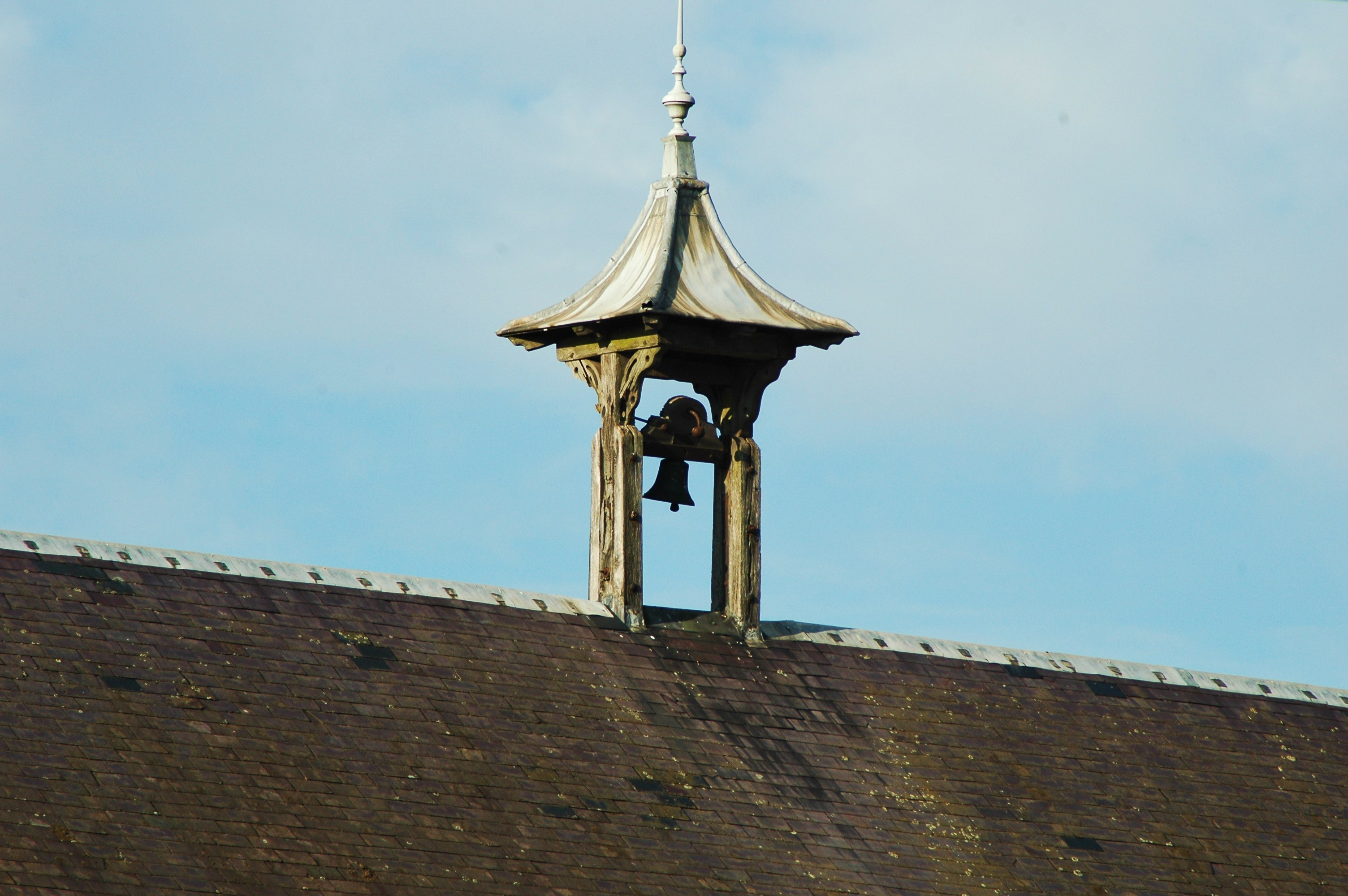 Brucamps (Somme, France). La cloche de l'ancienne école communale.